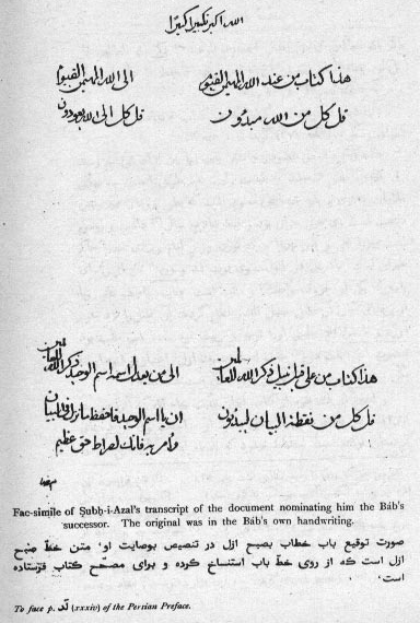 صورت توقیع سیدعلی باب در تنصیح بوصایت صبح ازل